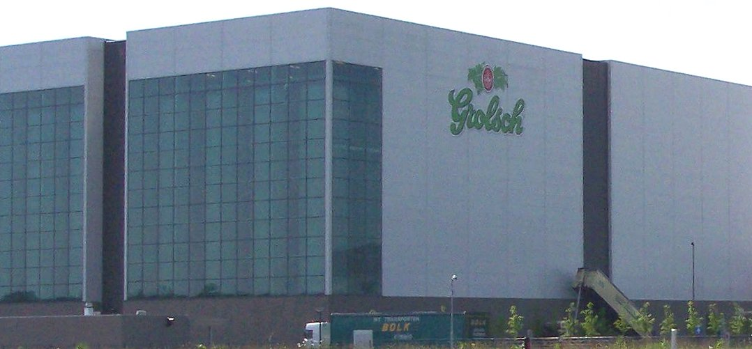 Boekelo Enschede Grolsch brewery; gekopieerd van commons.